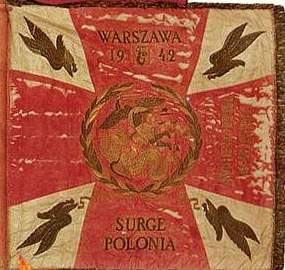 Sztandar 1 Samodzielnej Brygady Spadochronowej gen. Stanisława Sosabowskiego